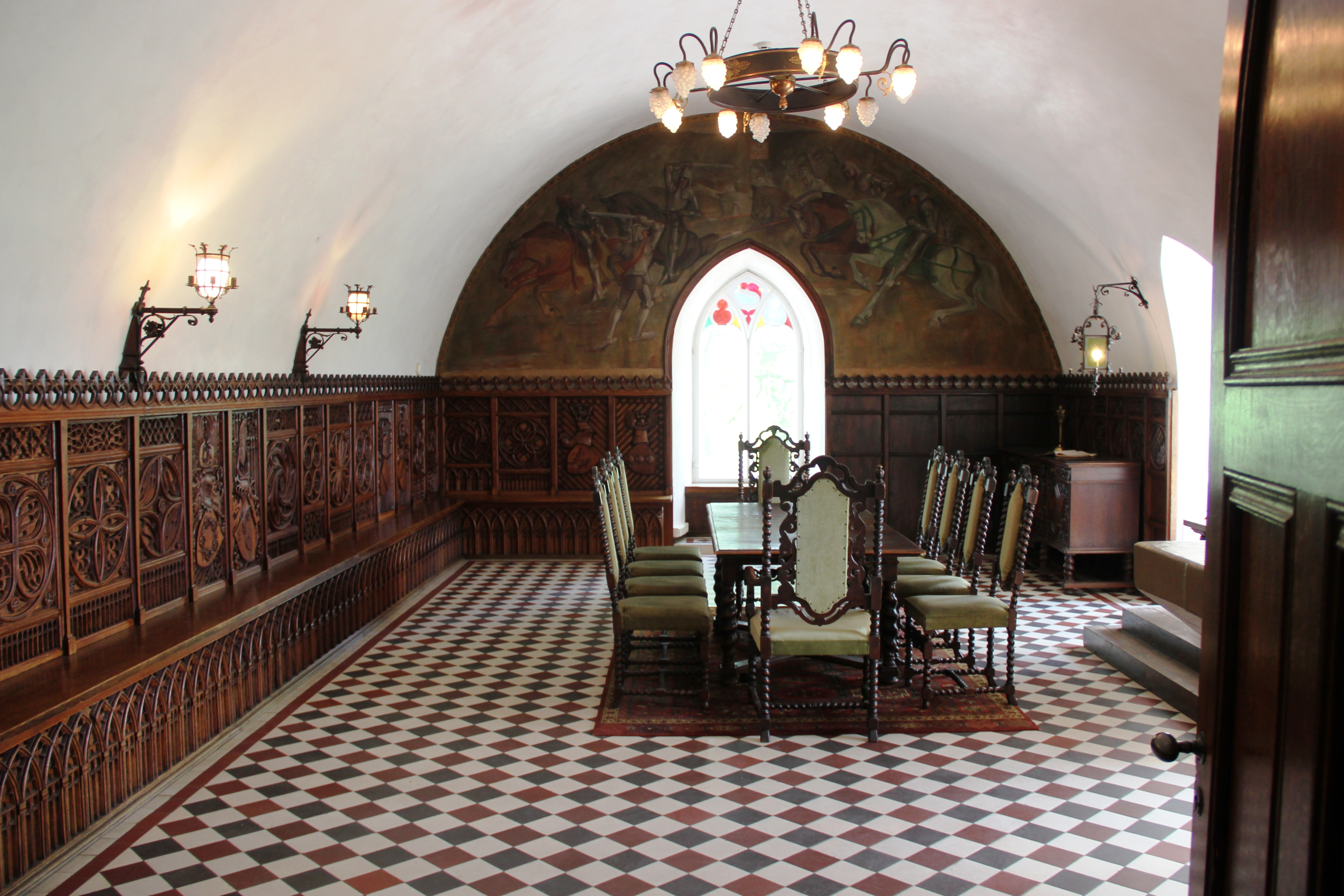 Suitian kartanon alakerran "ritarisaliksi" sisustettu ja nimetty sali. Ikkunapäädyssä Axel Haartmanin maalaus, joka kuvaa Kirkholman taistelua